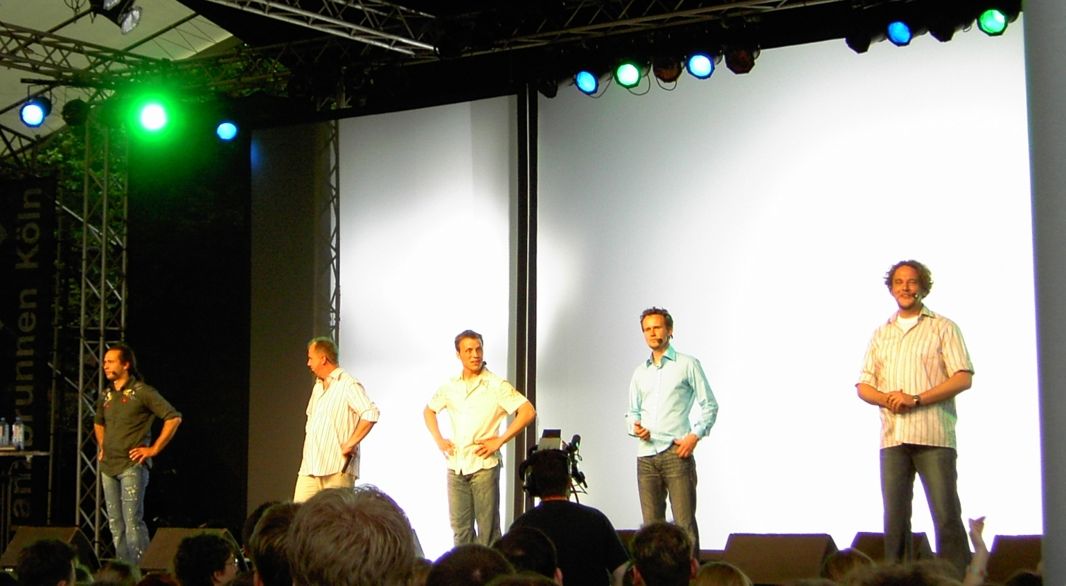 Die Wise Guys auf ihrem Konzert im Tanzbrunnen, Köln 2005